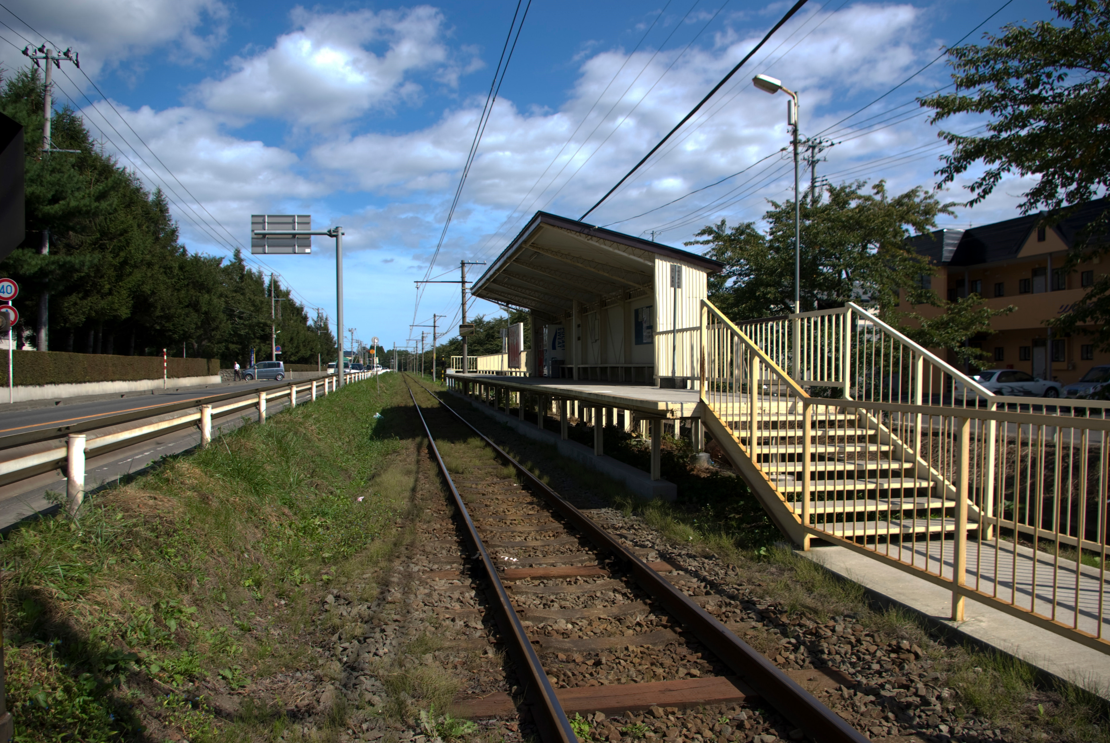 十和田観光電鉄工業高校前駅